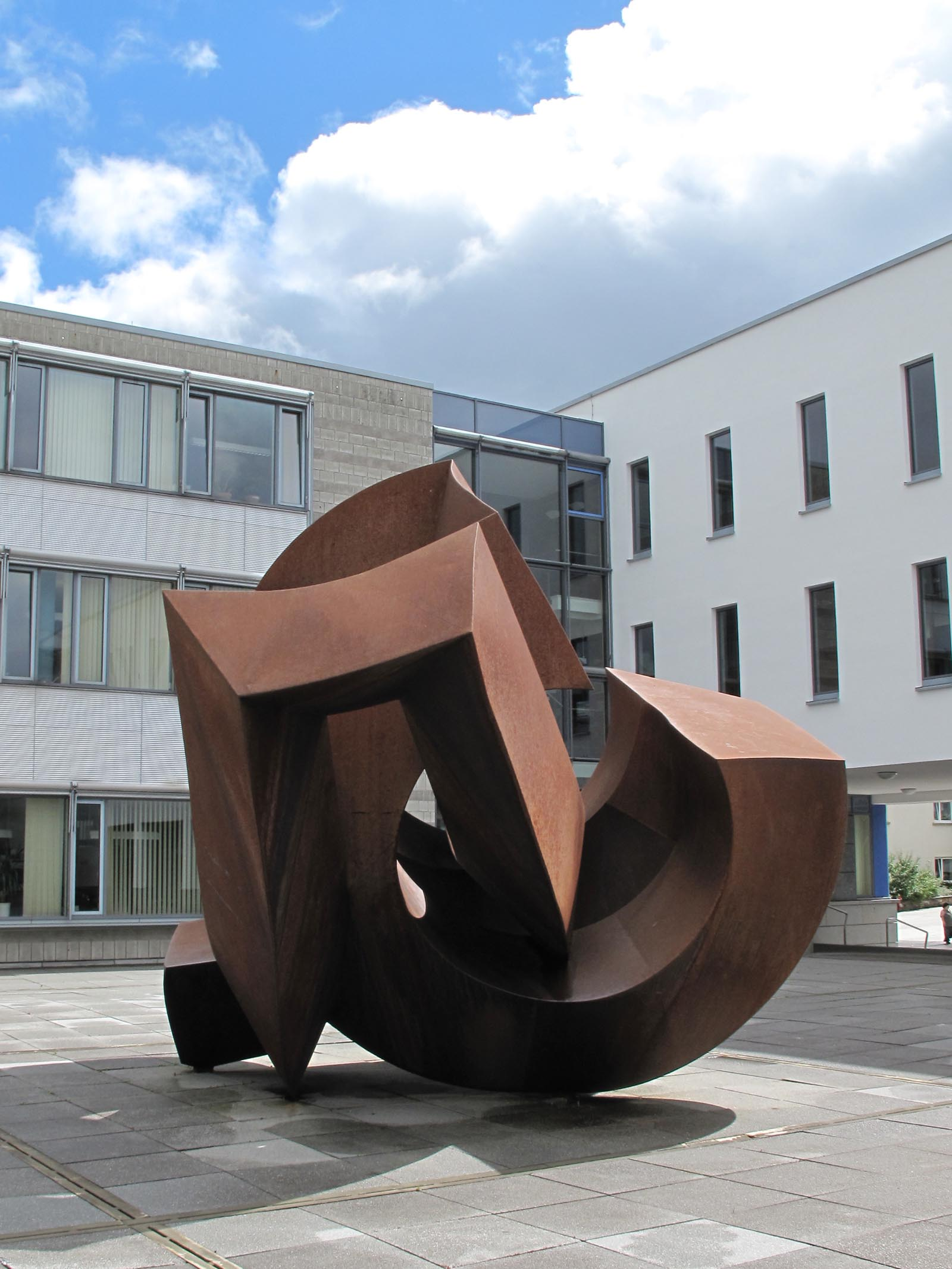 Jörg Bach, Begegnung, 2002, - Deutschland, Baden-Württemberg, Tuttlingen, Landratsamt, Heinrich-Rieker-Straße